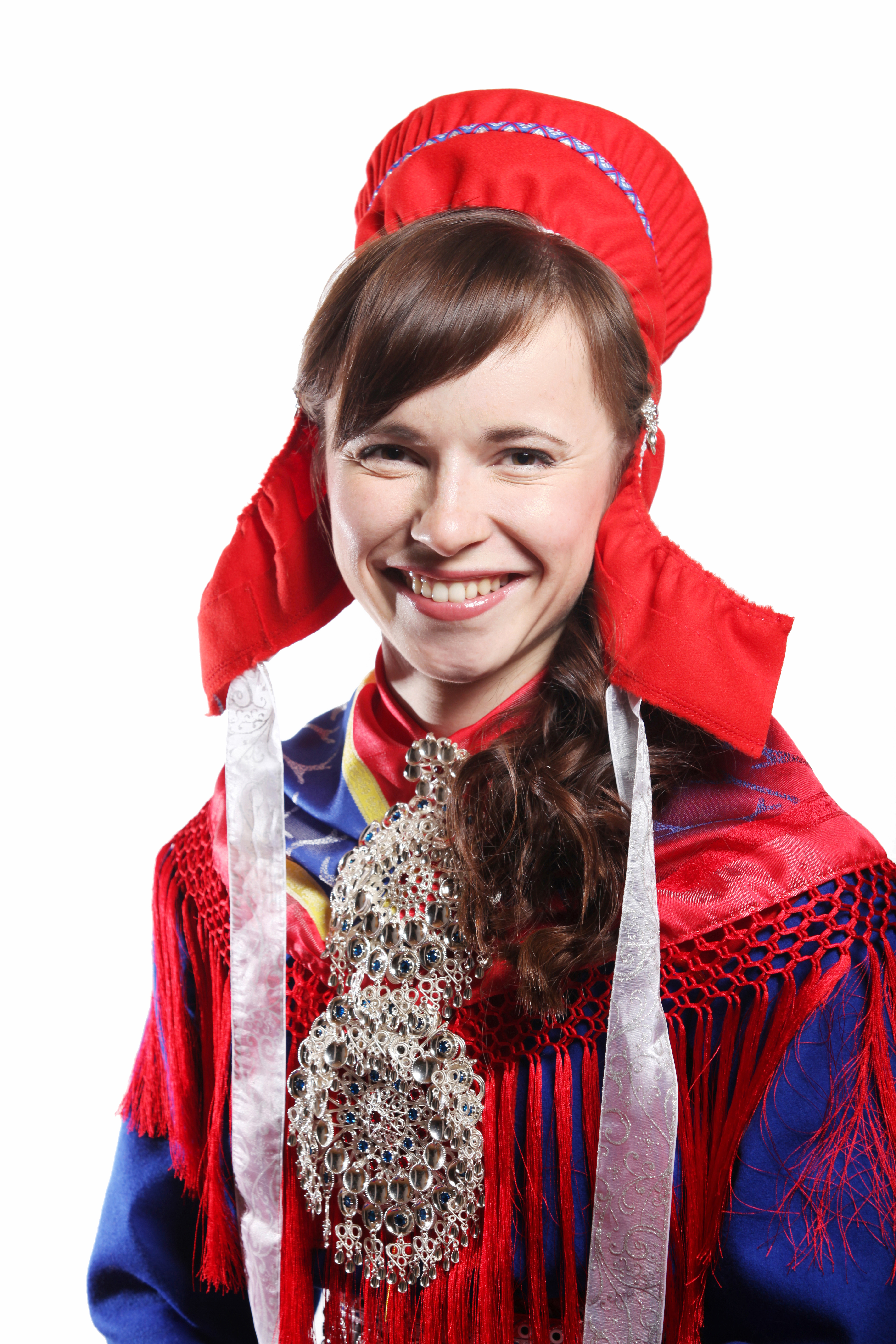 Medlem av næring- og kulturkomitéen. Foto: Kenneth Hætta / Sametinget.